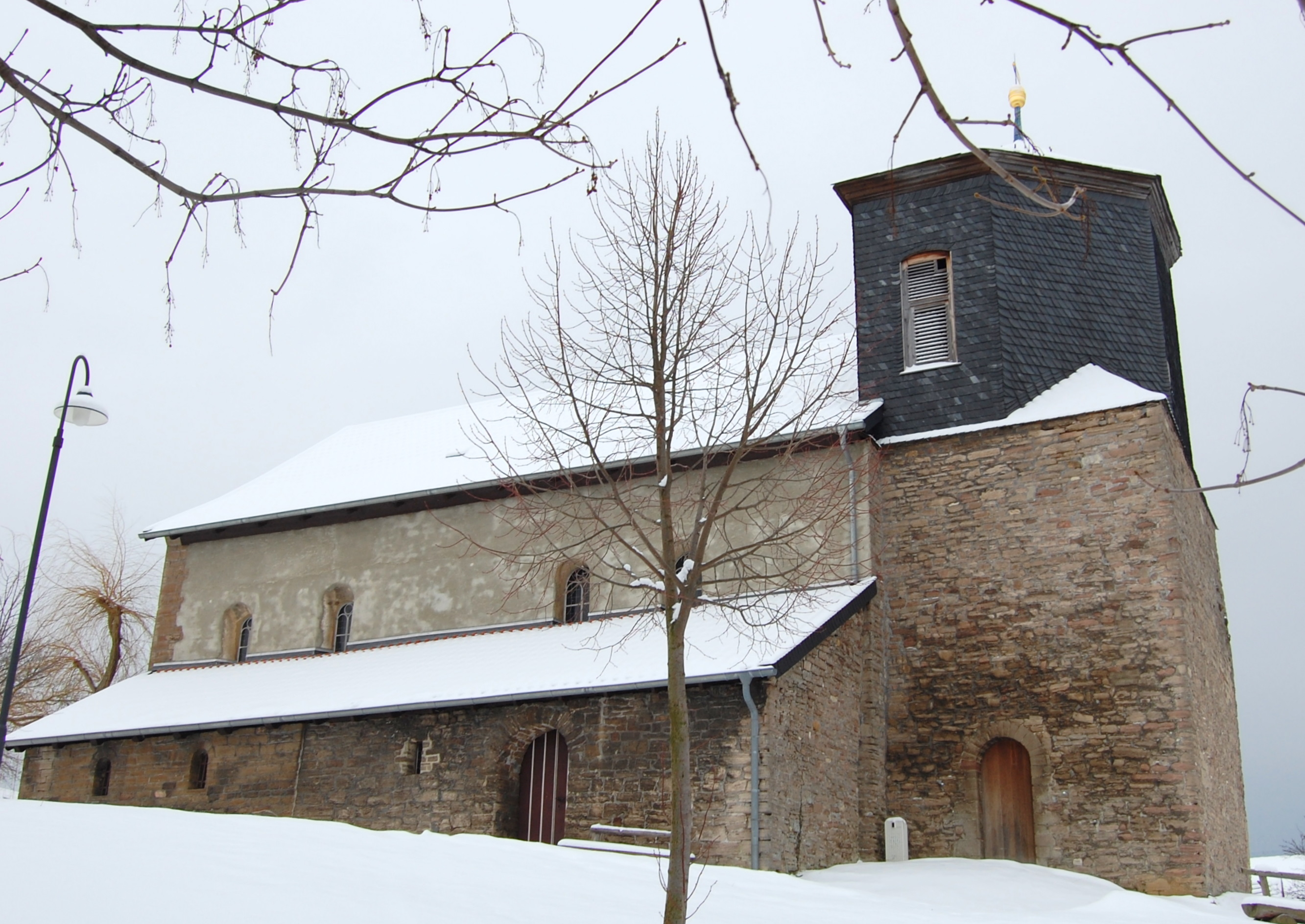 Sankt-Katharina-Kirche Altenrode